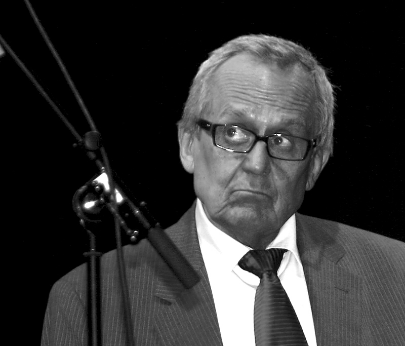 Dieter Hildebrand, deutscher Kabarettist